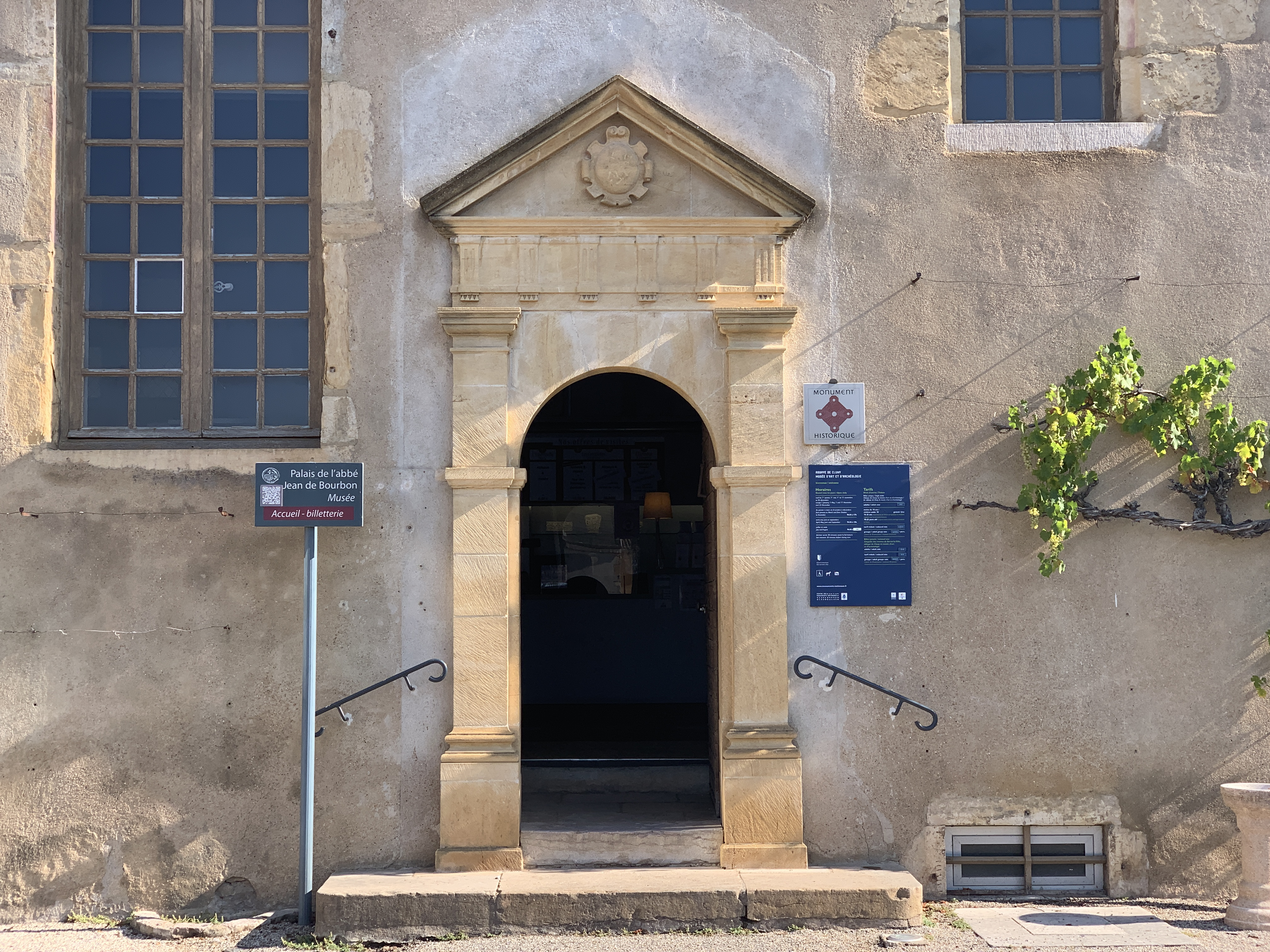 Palais de l'Abbé Jean de Bourbon, Cluny.